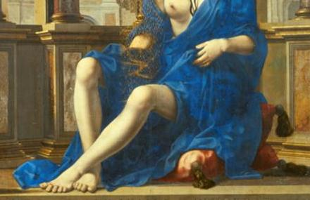 Danae